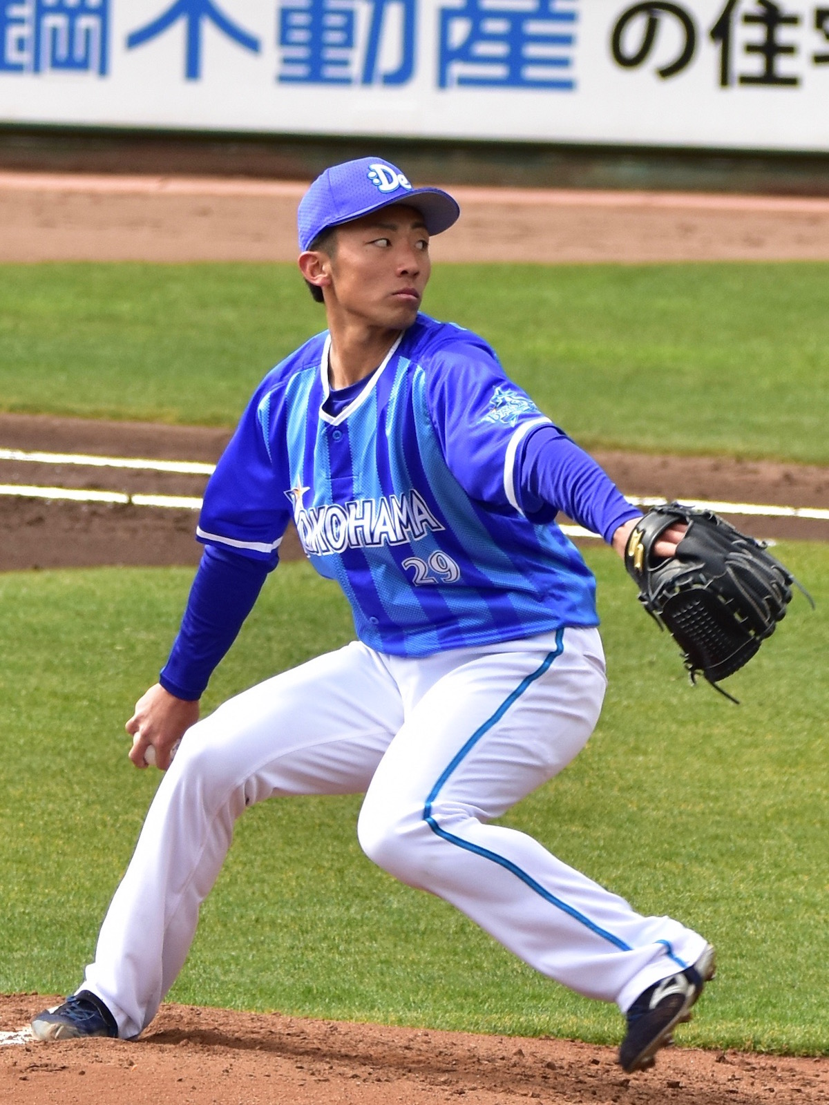 横浜DeNAベイスターズ 尾仲祐哉投手 2017年3月8日、ほっともっとフィールド神戸にて